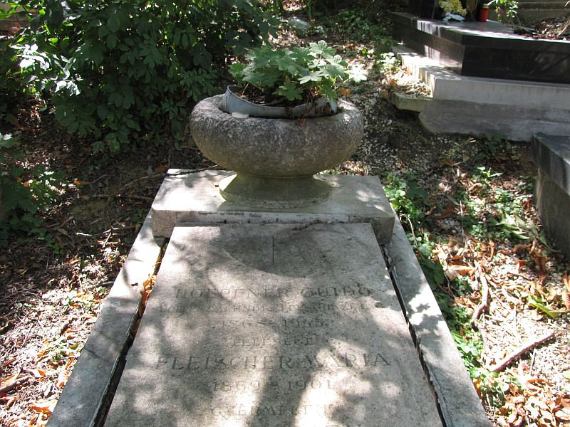 Hoepfner Guido (Szepesváralja, 1868 – Budapest, ? ) építész sírja Budapesten. Farkasréti temető: 19/3-1-13.